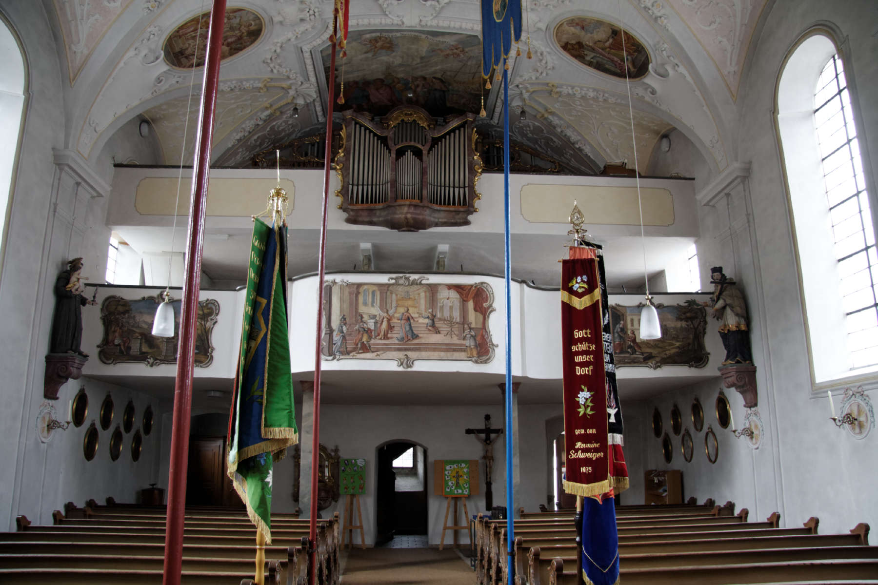 Unterammergau, Pfarrkirche St. Nikolaus